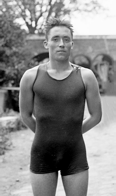 [7-8-20, bassin de la Villette], championnat de France [militaire de natation], Mayaud [nageur de Joinville, ex-aequo du 300 m nage libre] : [photographie de presse] / [Agence Rol]